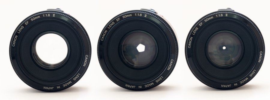 Blende eines 50mm-Objektivs bei den Blendenzahlen 1.8, 8 und 22